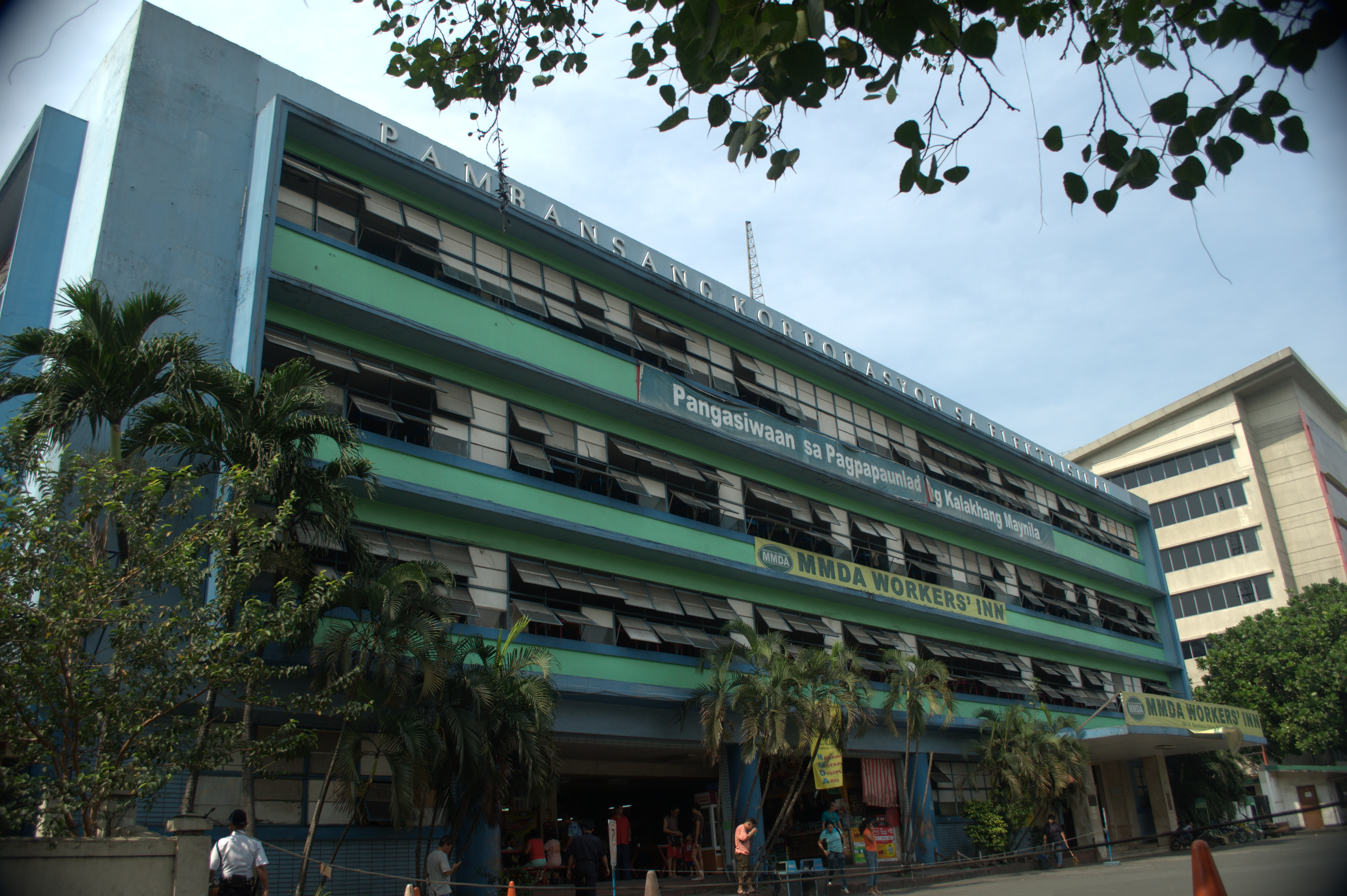 Gwapotel at Manila South Harbor in Manila, Philippines